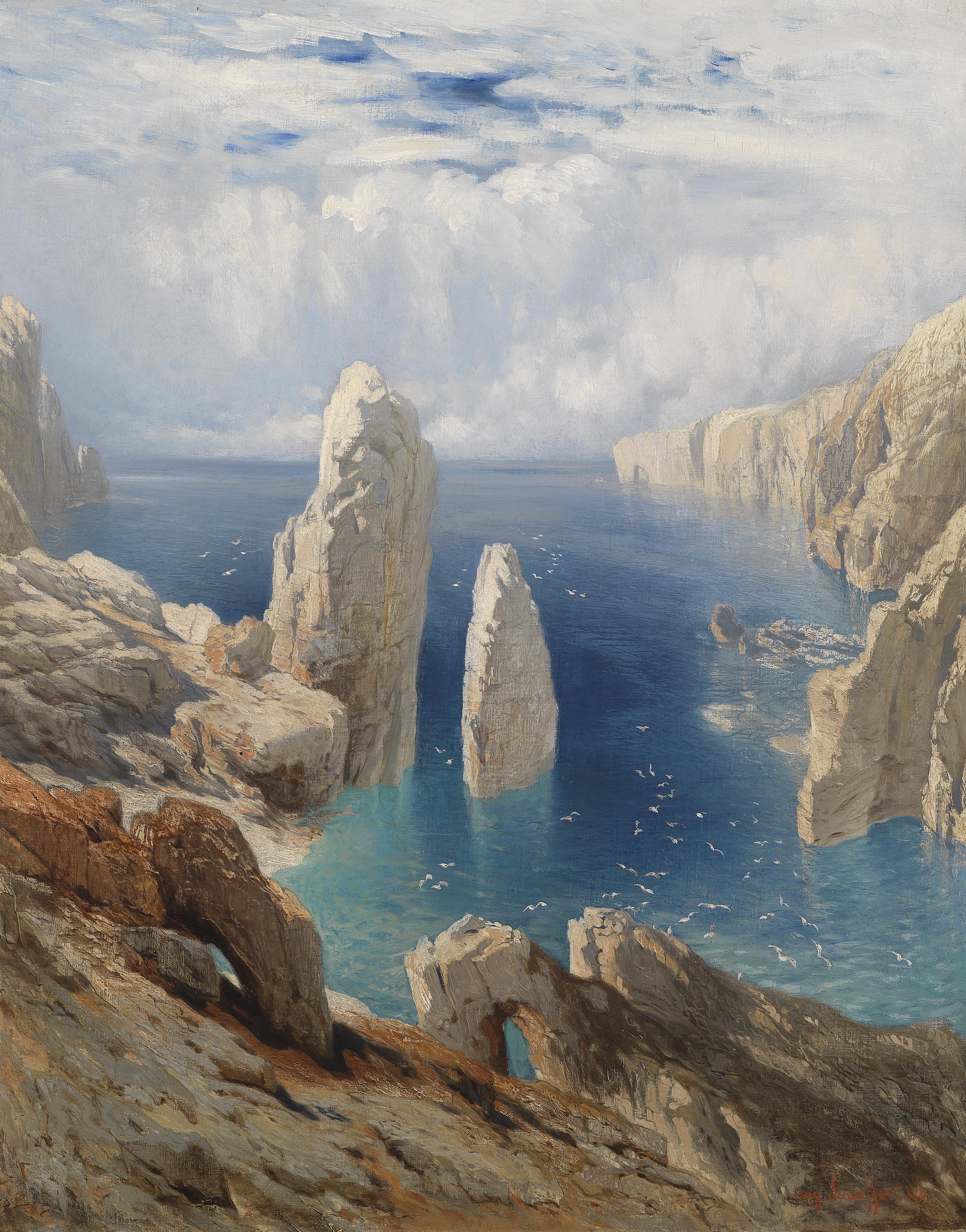 Steilküste